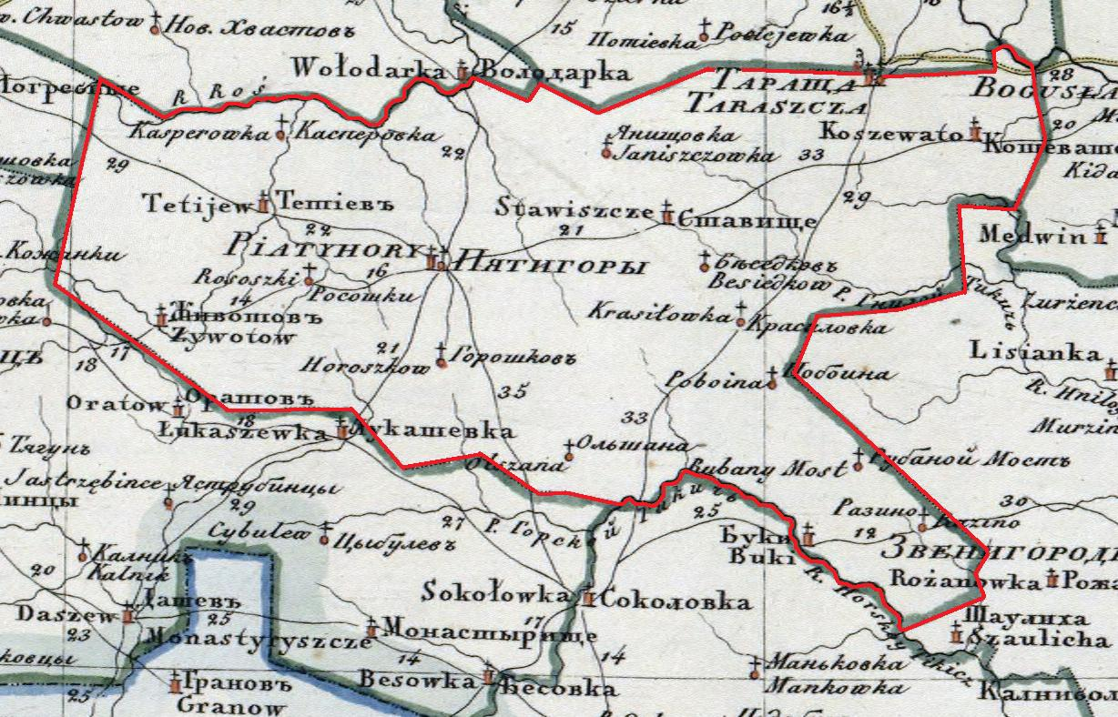 Dwujęzyczna, polsko-rosyjska mapa powiatu taraszczańskiego